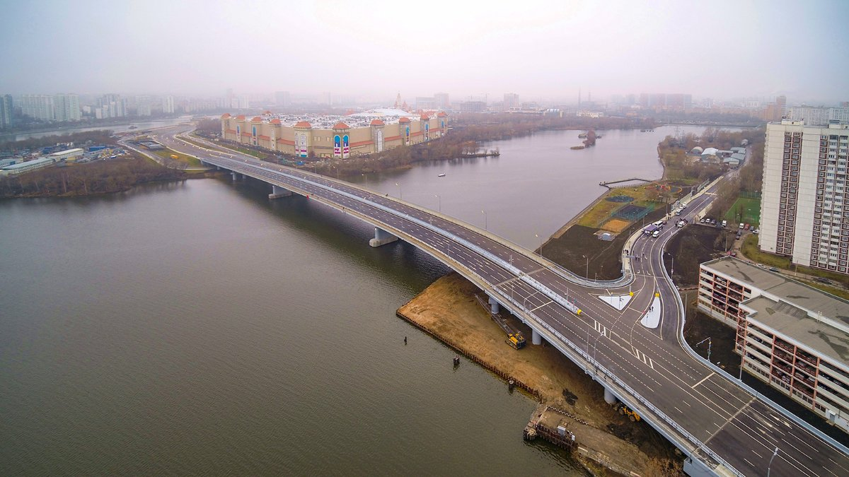 Кожуховский мост в Москве